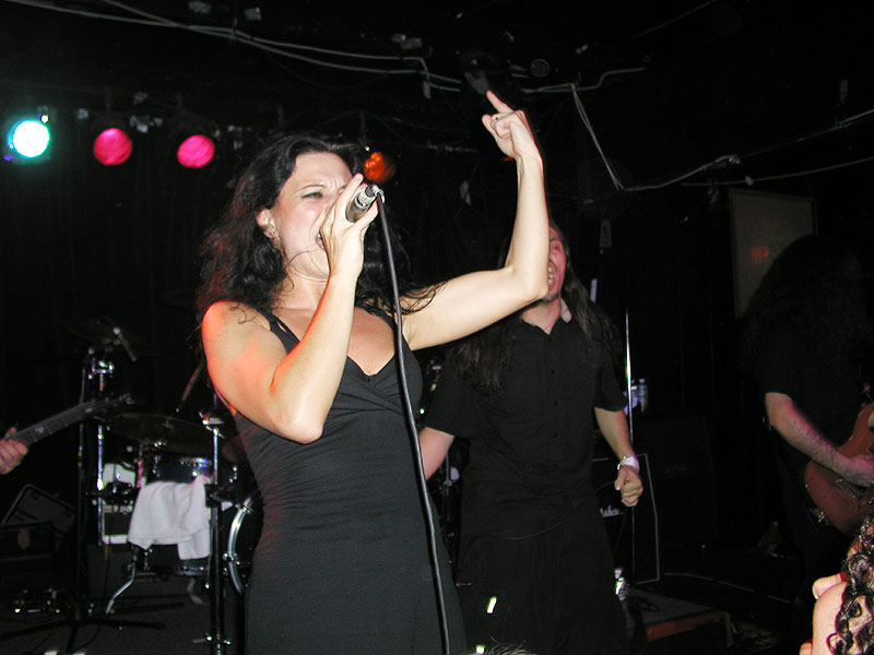 Lacuna Coil = 2003